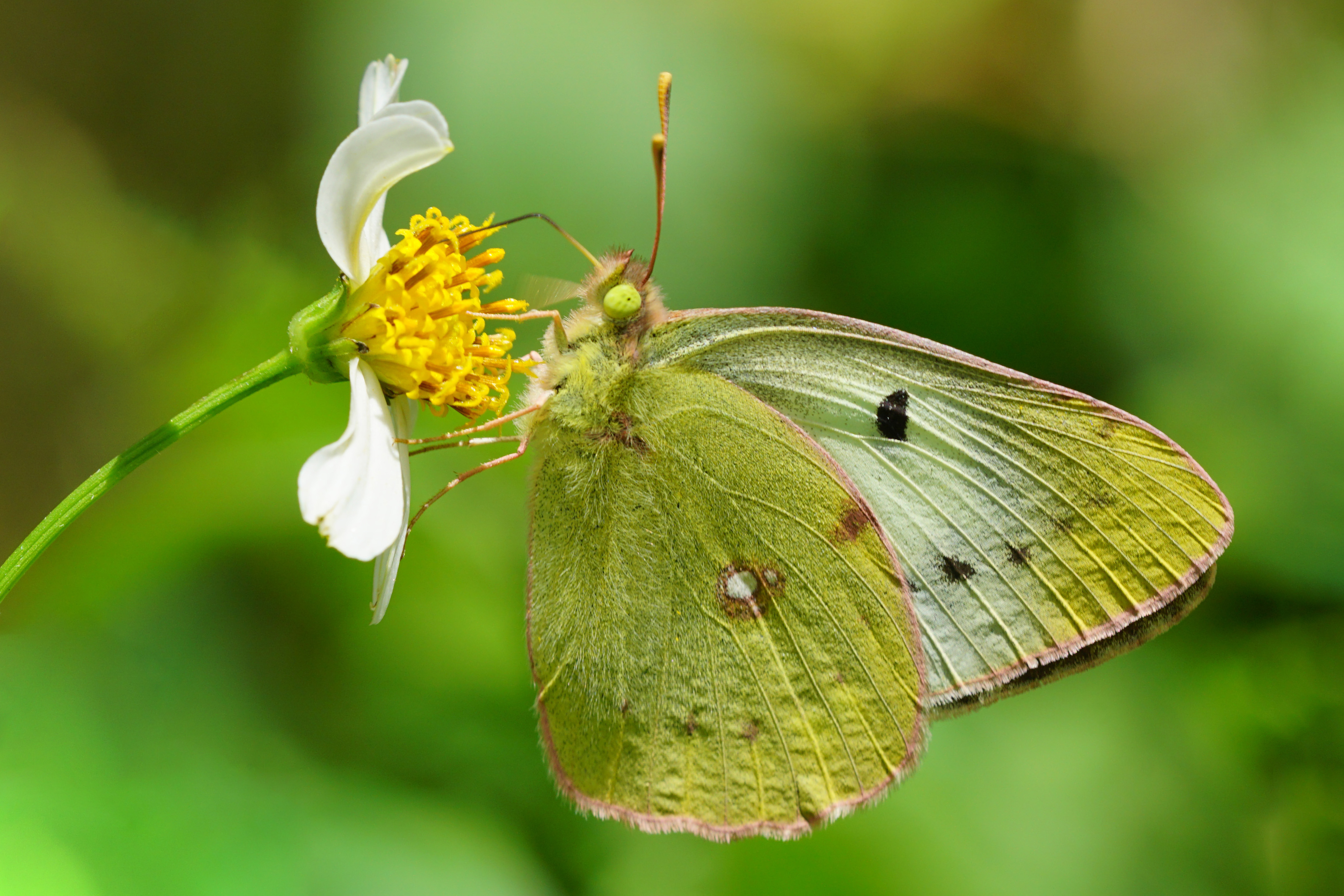 紋黃蝶 Colias erate formosana